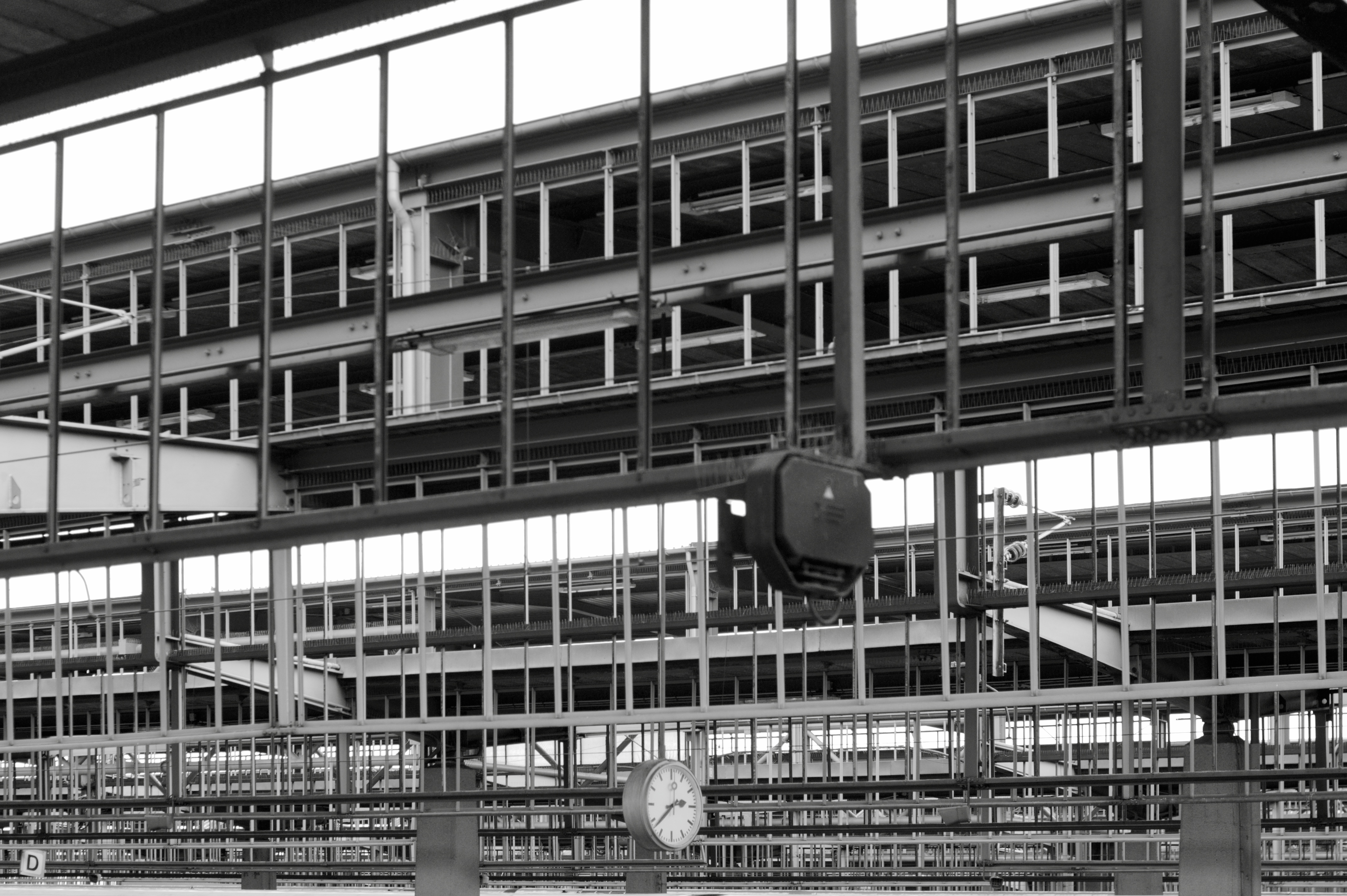 Freigelegte Konstruktion der Gleisdächer im Stuttgarter Hauptbahnhof